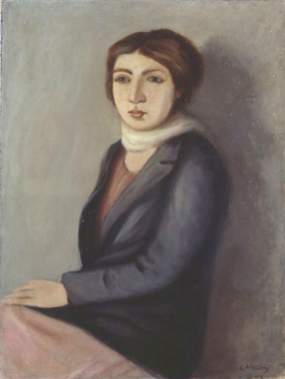 Tableau Femme en veste, de Léon Weissberg